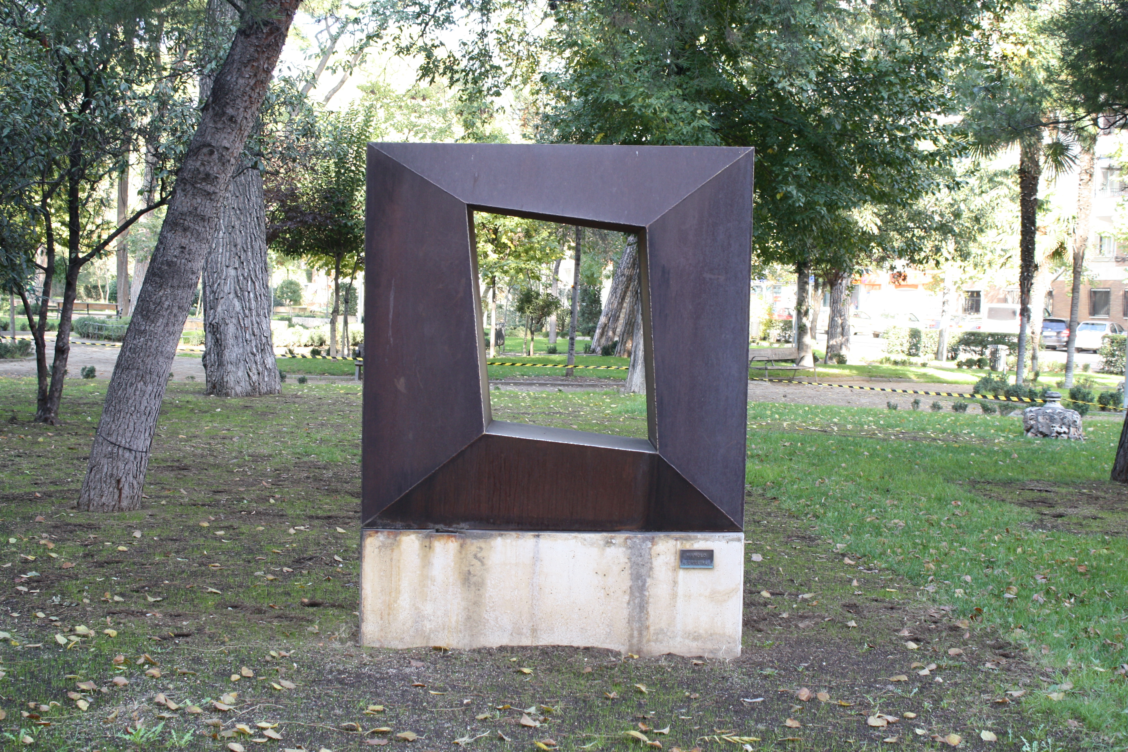 Museo de escultura al aire libre. Escultor: Jorge Varas. Alcalá de Henares. Comunidad de Madrid. España